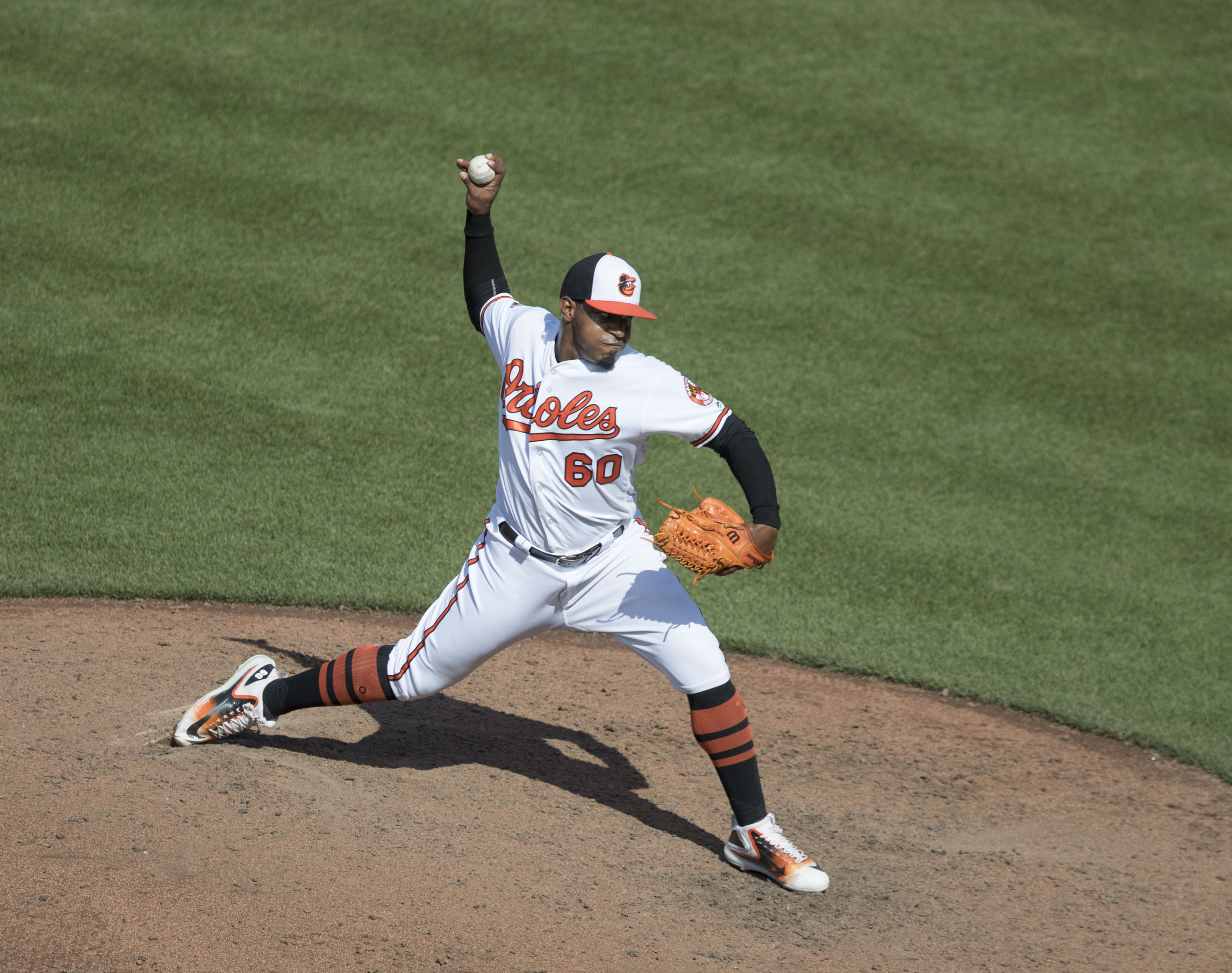 Astros at Orioles 7/23/17